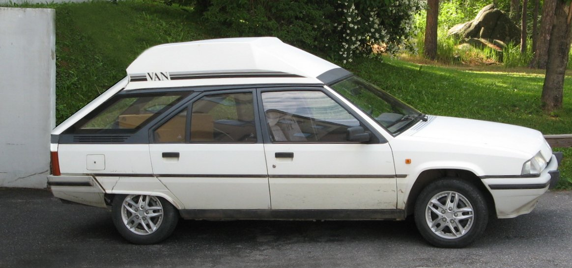 Citroen BX Break, special version in Finland